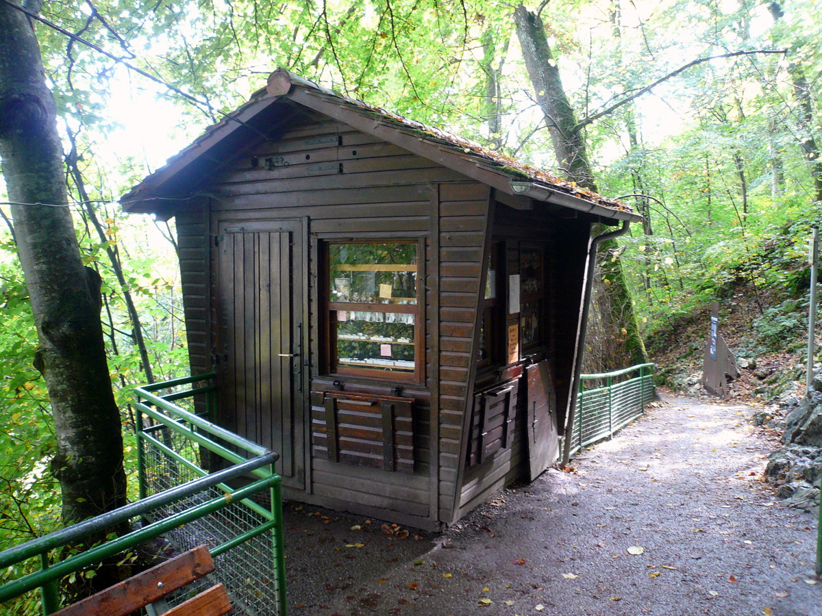 Charlottenhöhle